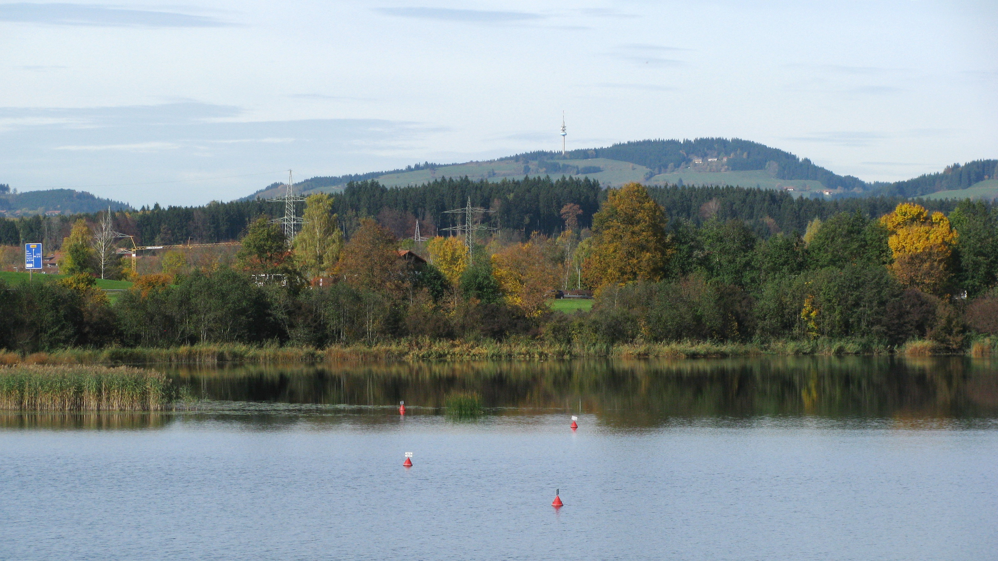 Der Blender vom Sulzberger See aus gesehen